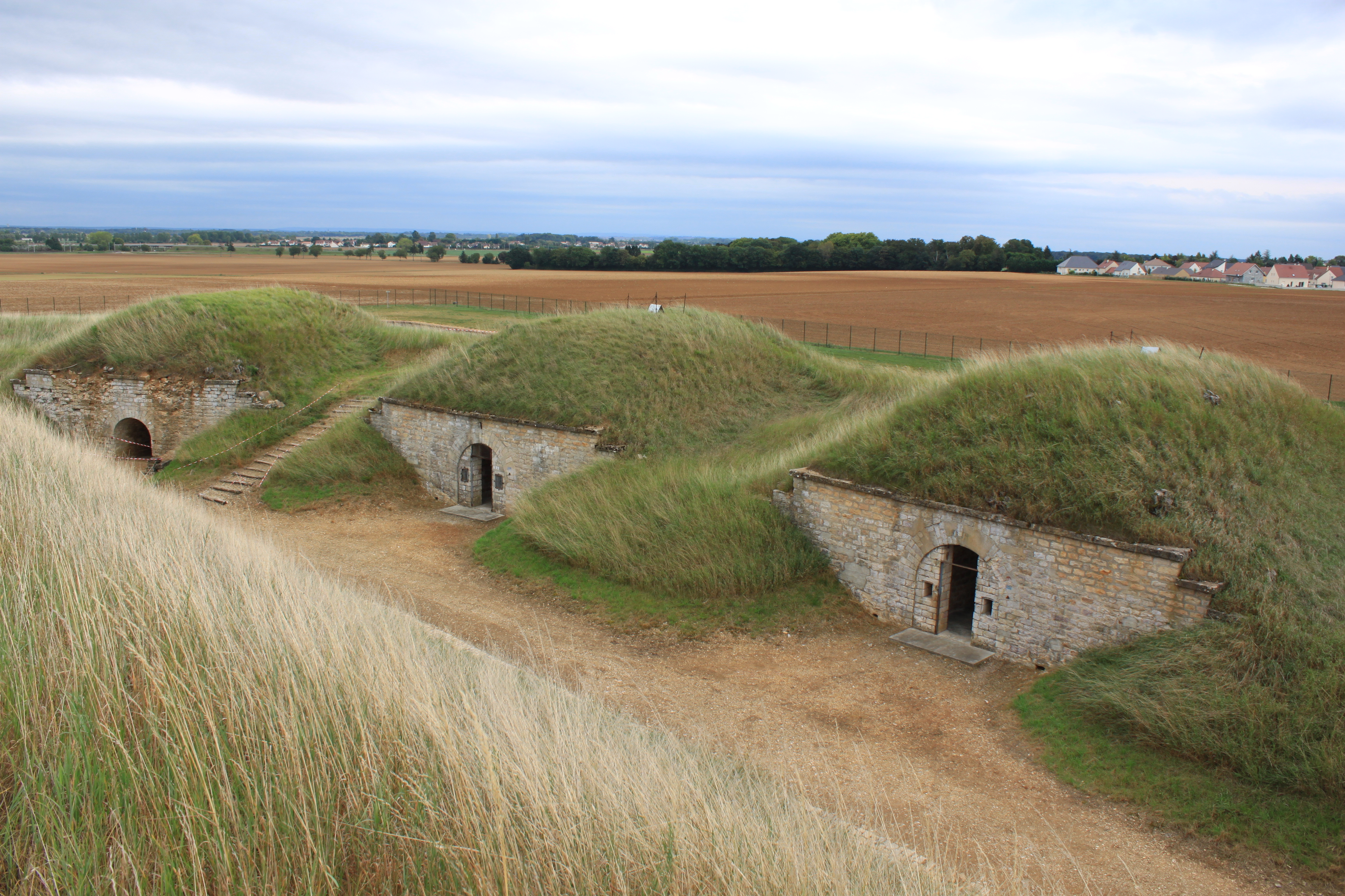 Fort de Beauregard, Fenay, Côte-d'Or, Bourgogne, FRANCE